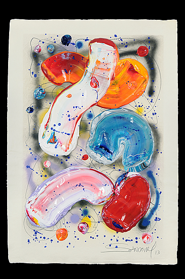 "BUTTERFLYS II" (2012-13). Mixta / lino - 145x95 cm.